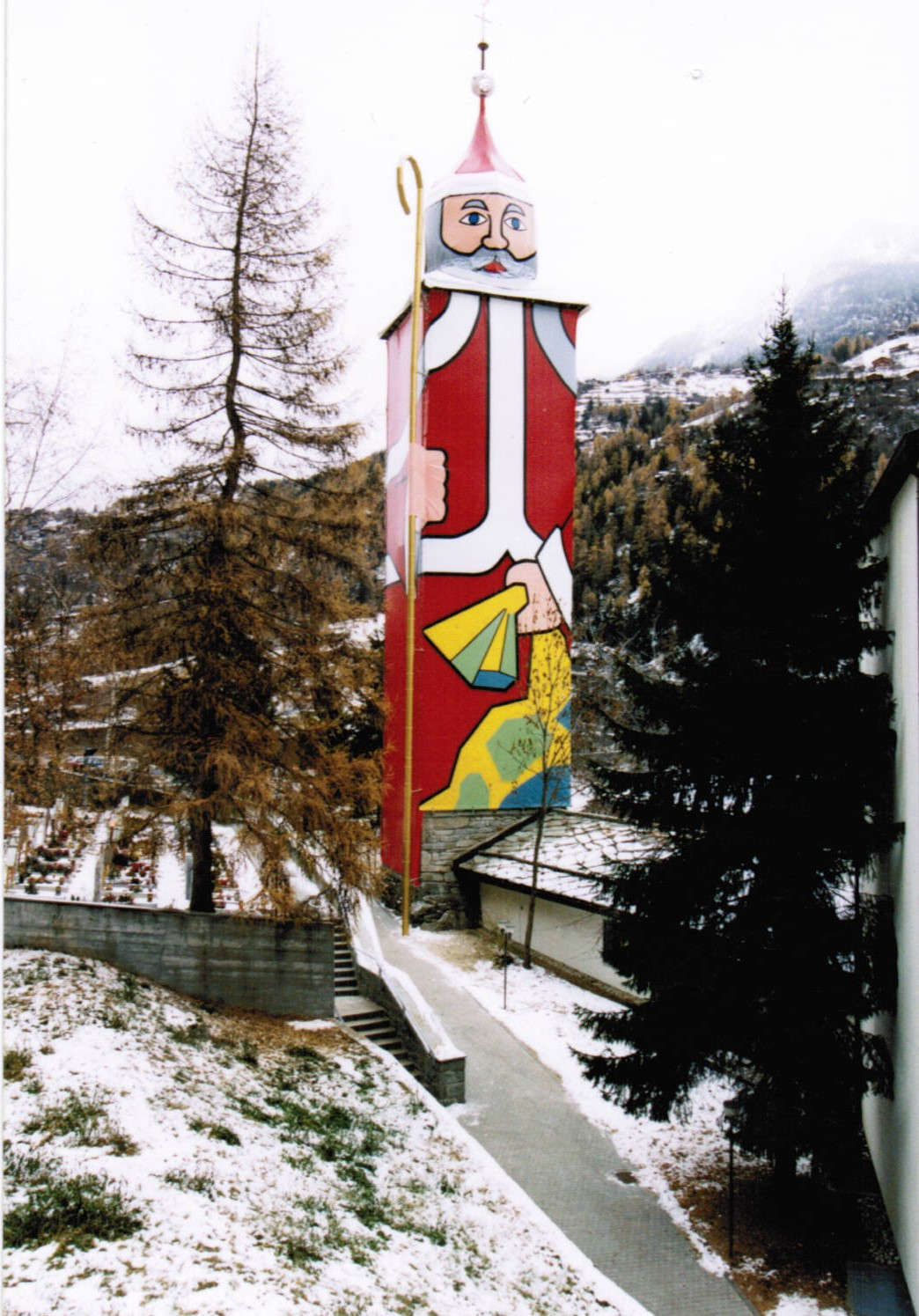 Grösster Niklolaus der Welt, St. Niklaus, Schweizer Kanton Wallis. Der Kirchturm der Pfarrkirche St. Niklaus VS wird während der Weihnachtszeit als Nikolaus eingekleidet.